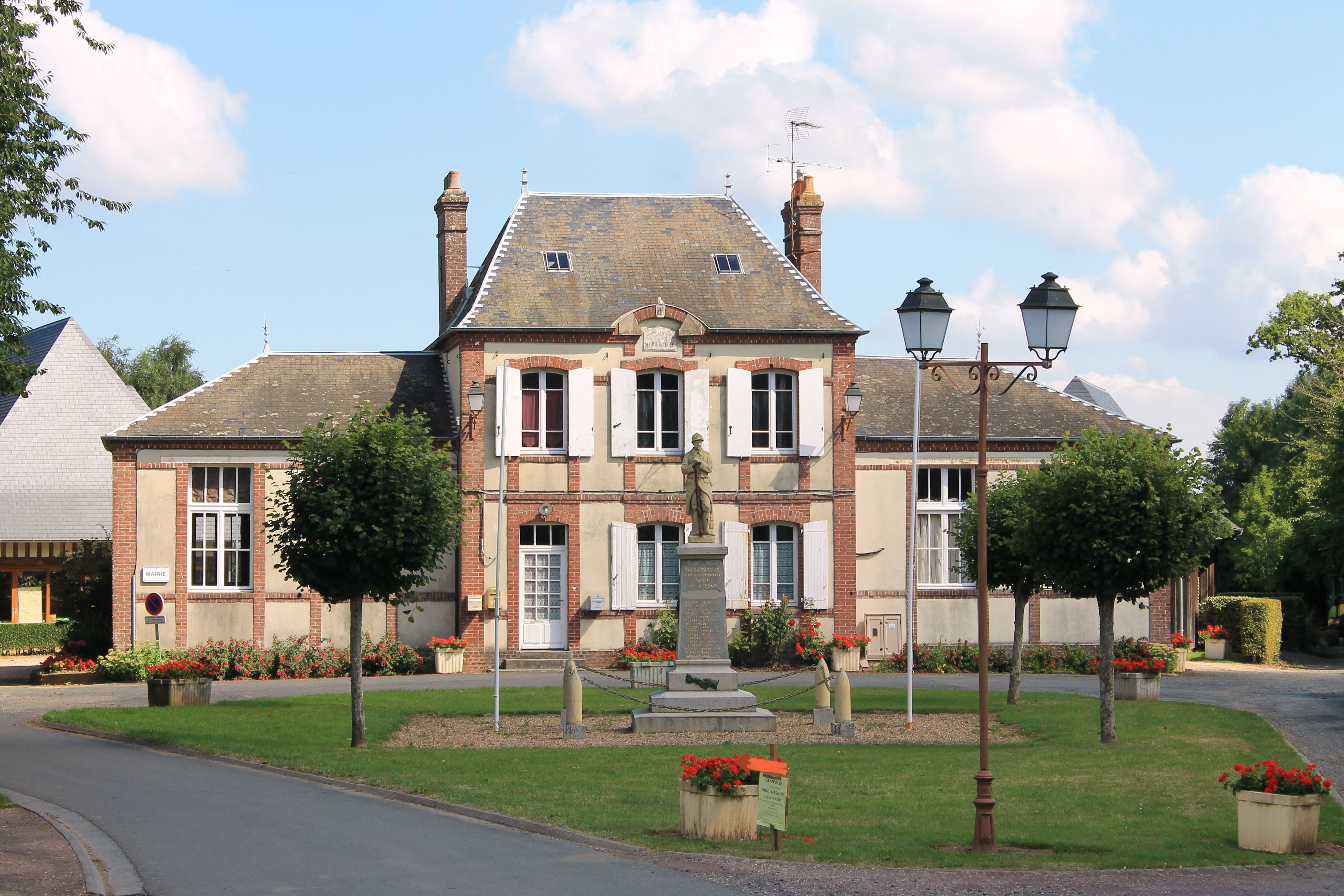 Mairie et monument aux morts de Bourgeauville (Calvados)